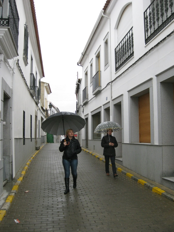 Calle Buensuceso, en el corazón del pueblo. Noviembre de 2011